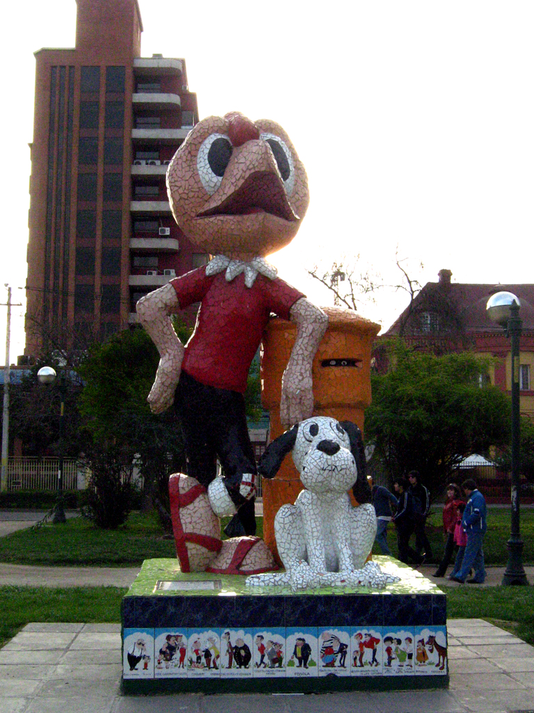 Estatua de "Condorito y Washington".